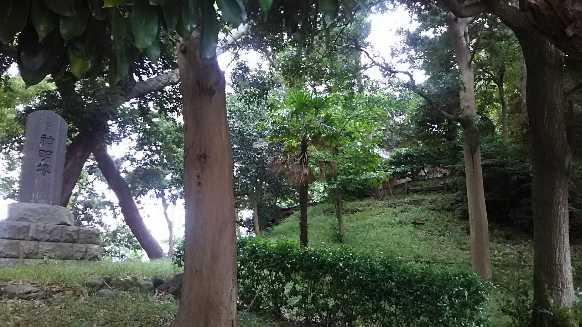 南西から見た石碑と神明塚古墳